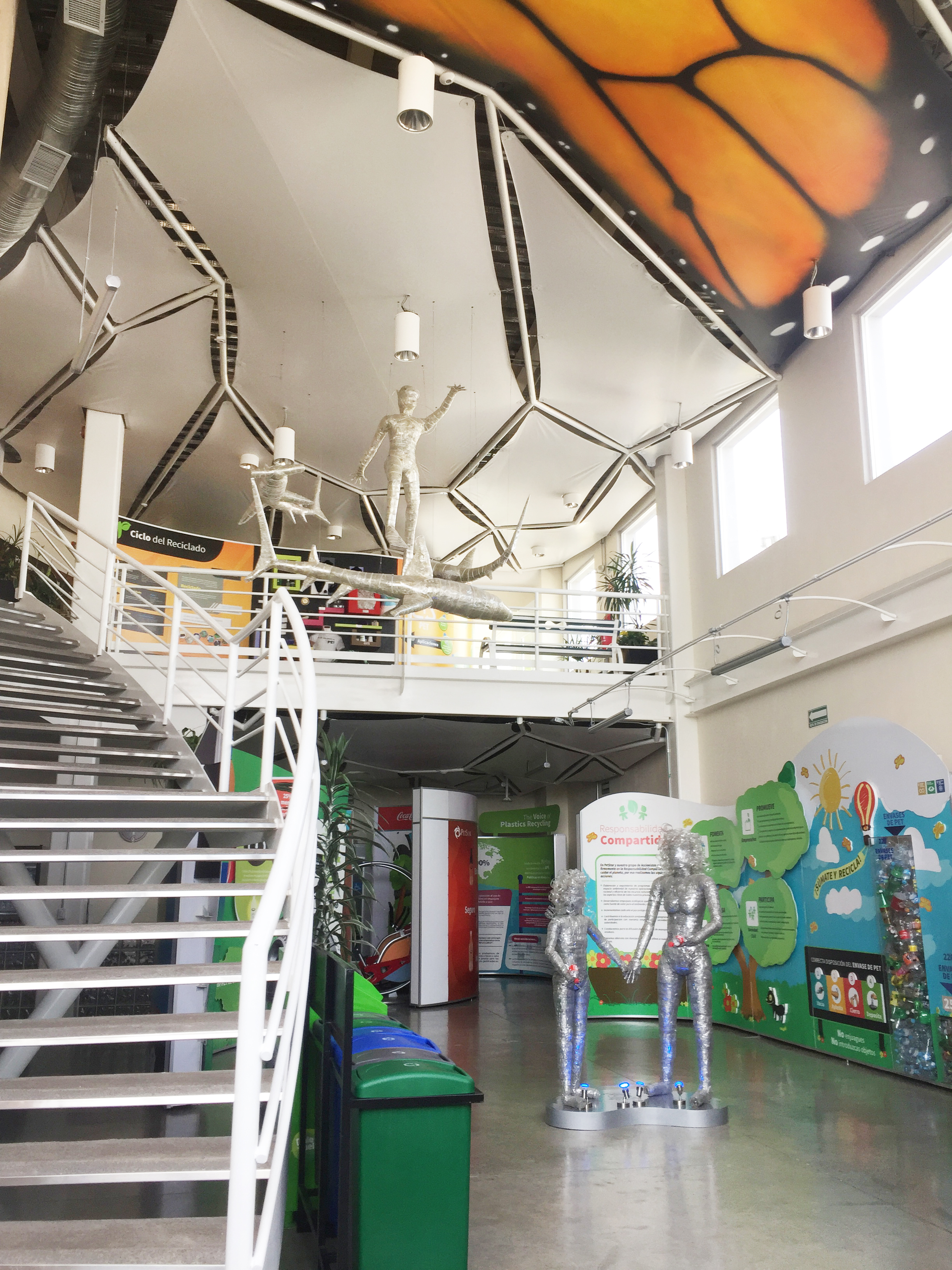 En este espacio se promueve el concepto de responsabilidad compartida entre la sociedad, autoridades y empresas privadas buscando generar una conciencia ambiental e impulsando la participación de todos los sectores en el reciclaje, mediante un programa de visitas guiadas. Es el Primer Museo en Latinoamérica en lograr la certificación LEED Platinum